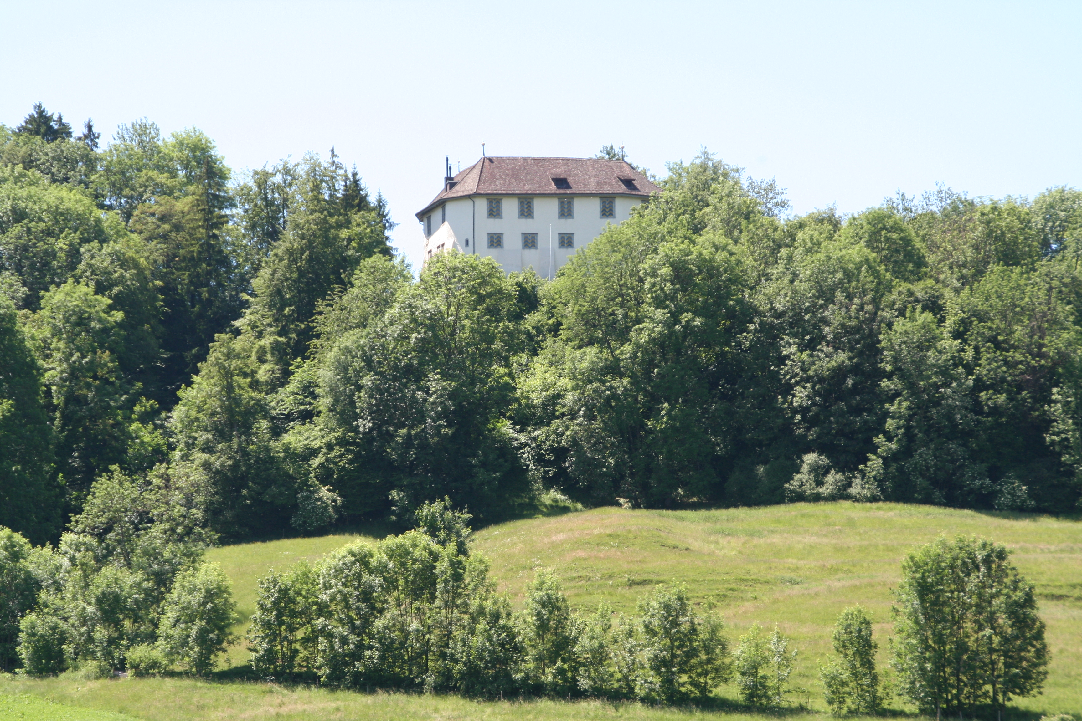 Elgg